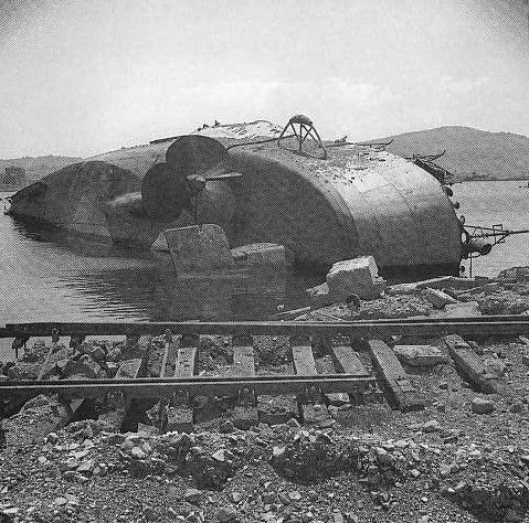 L'incrociatore leggero Ottaviano Augusto affondato ad Ancona dopo il bombardamento del 1 novembre 1943